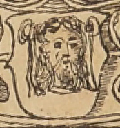 Герб Витебского воеводства из польского издания Статута Великого княжества Литовского 1588 года, изданного в 1614 году.